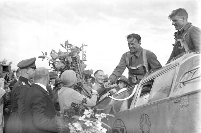 Die Ankunft der ersten Europa-Flieger auf dem Centralflughafen in Berlin-Tempelhof! Der vorjährige Sieger des Europa-Rundfluges Morzik bei seiner Ankunft als zweiter Deutscher auf dem Centralflughafen in Berlin, wird von seiner Gattin und Freunden begrüßt.